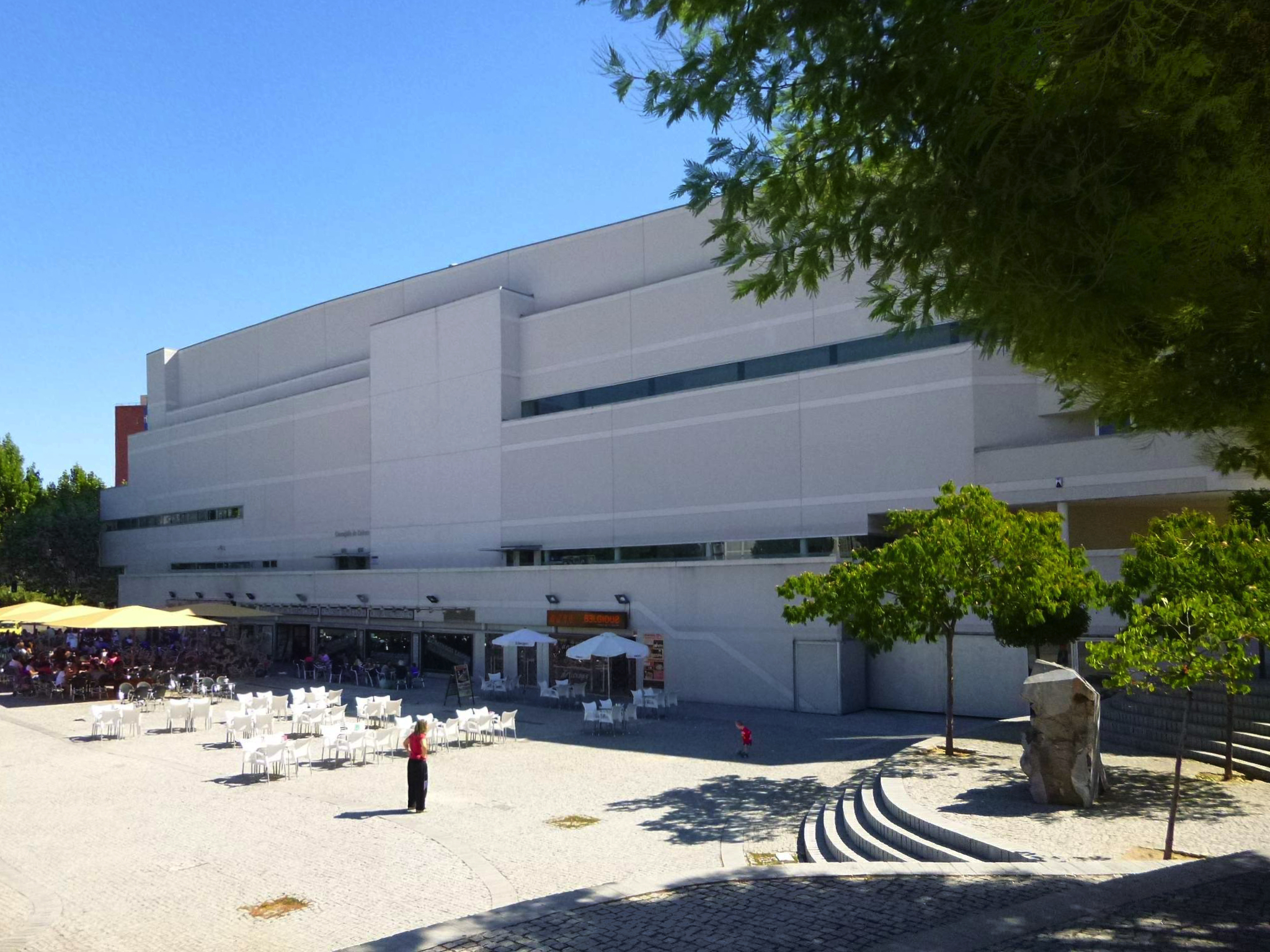 Centro Cultural Tomás y Valiente (CEART), en Fuenlabrada (Madrid)